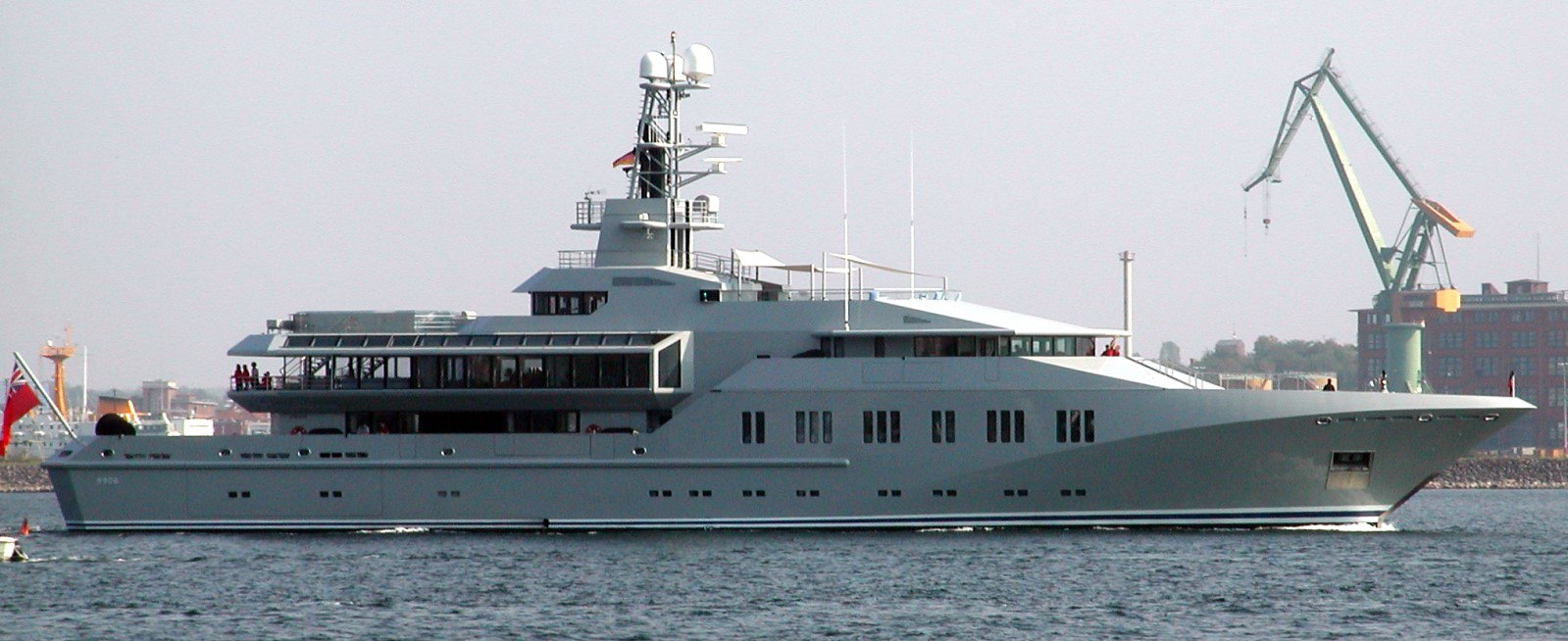 Mega-Yacht Skat im Kieler Hafen.